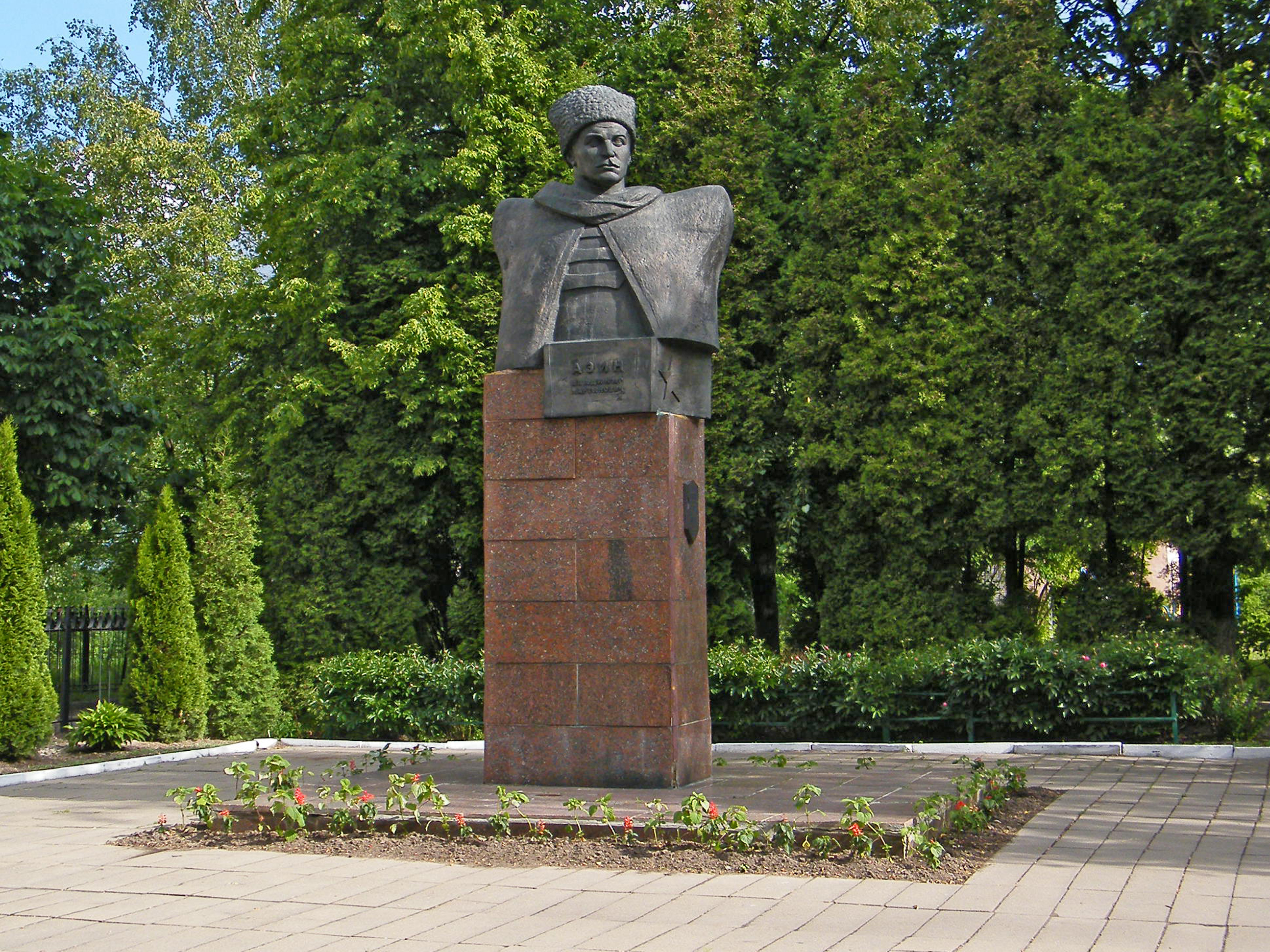 Бюст Владимира Азина